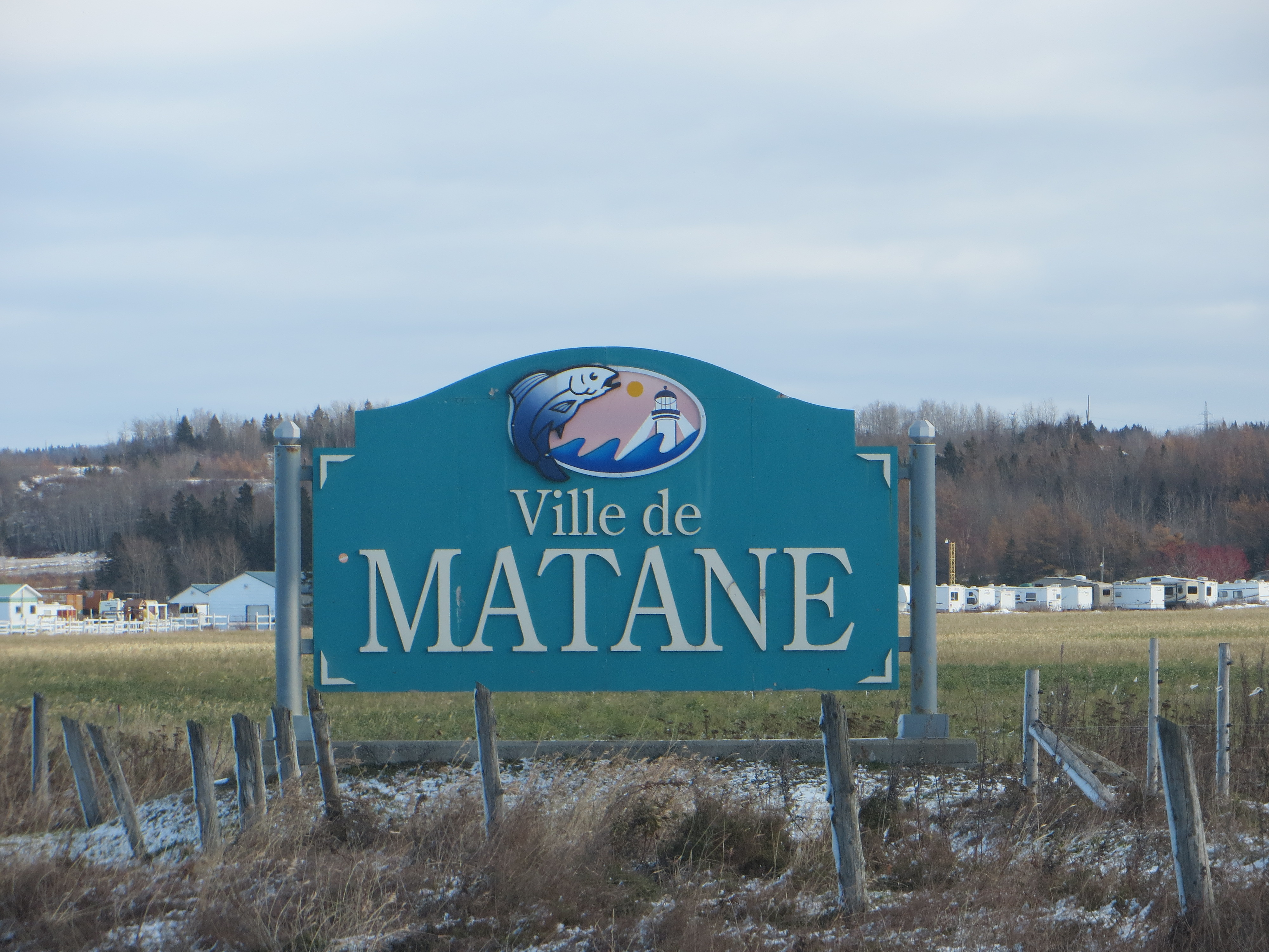 Aviso de bienvenida de Matane.